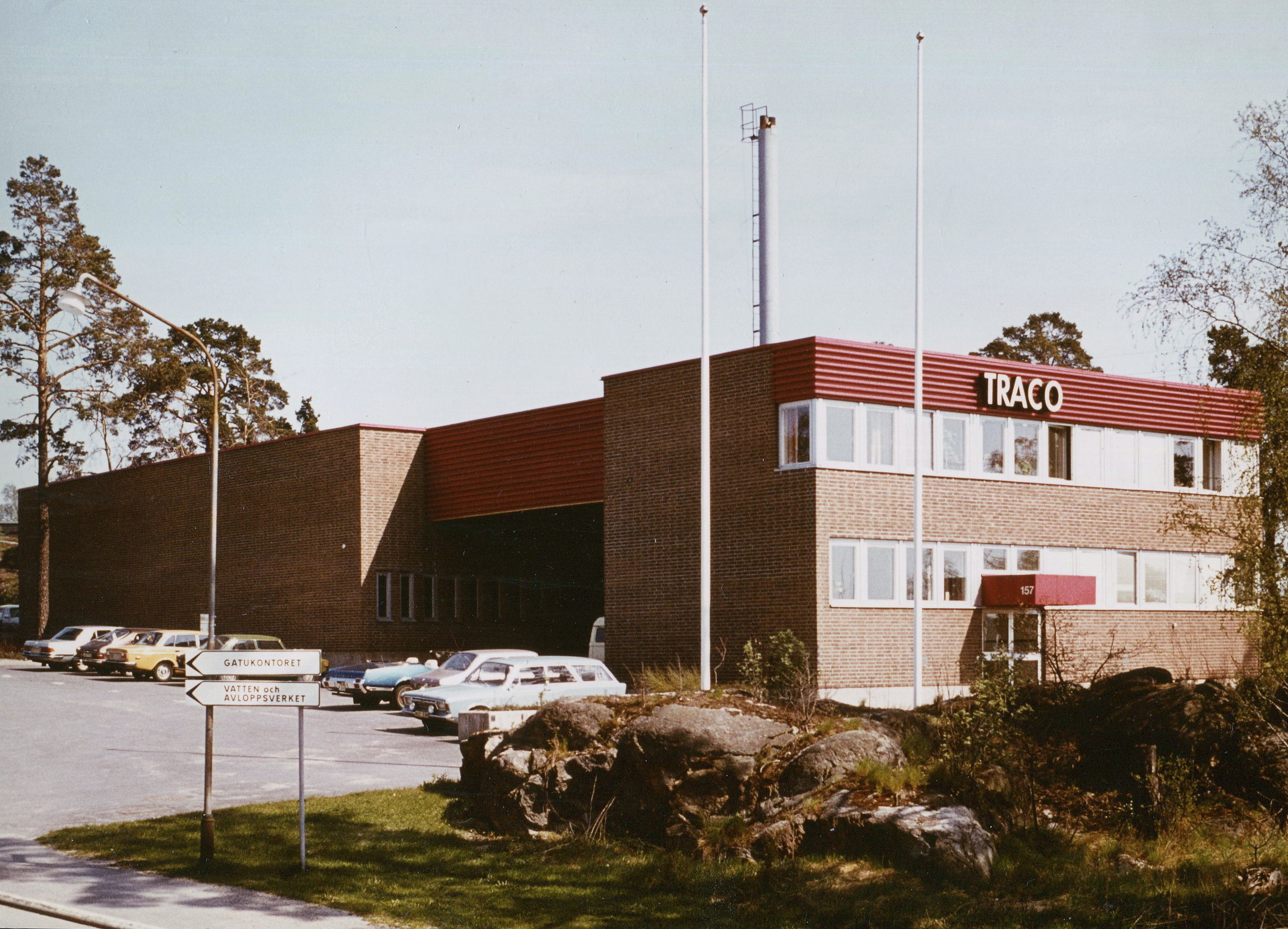 Kv Doggen, etapp 1, byggår 1973, arkitekt Yngve Fredrikén